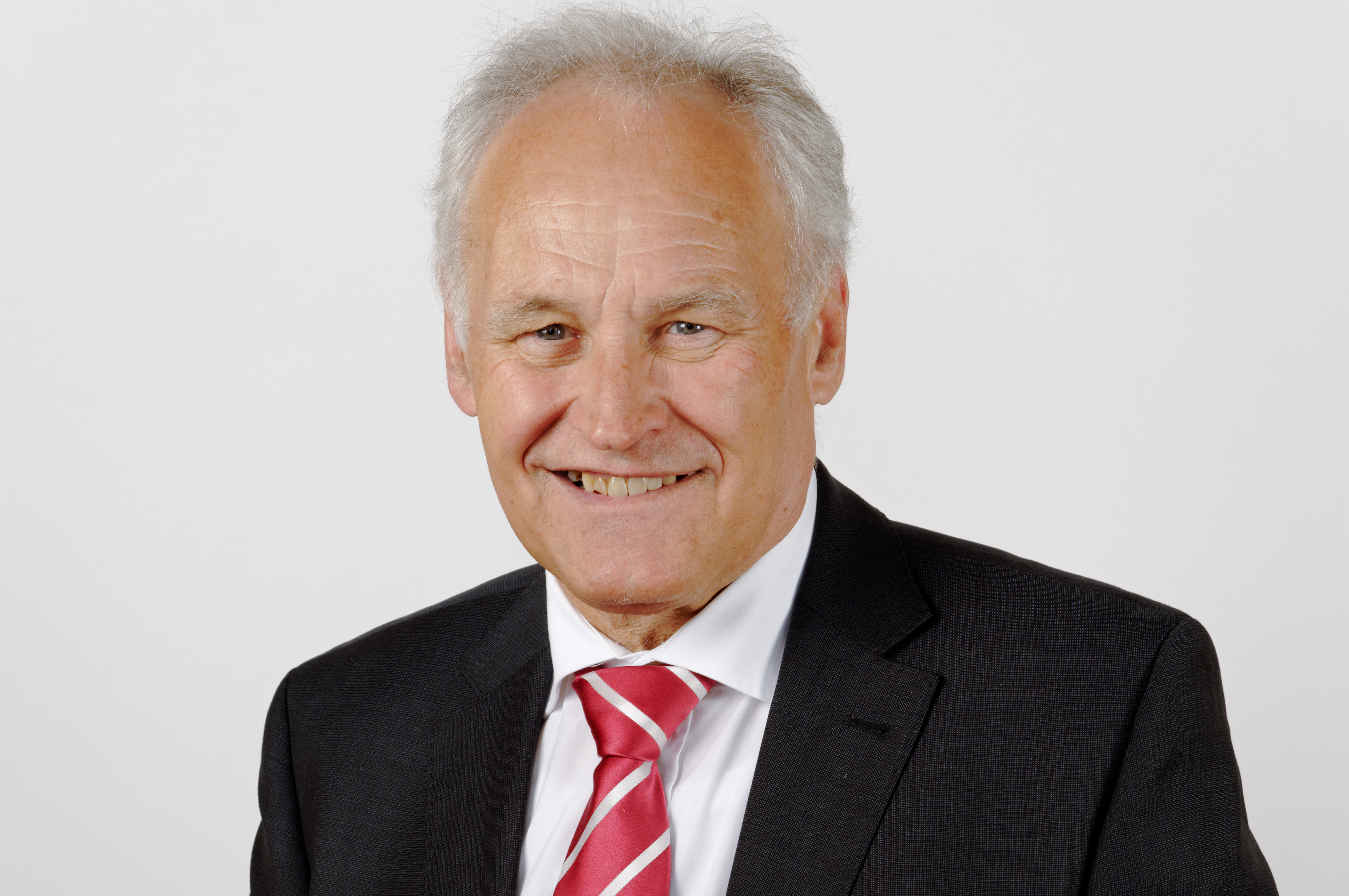 Landtagsprojekt Bayern